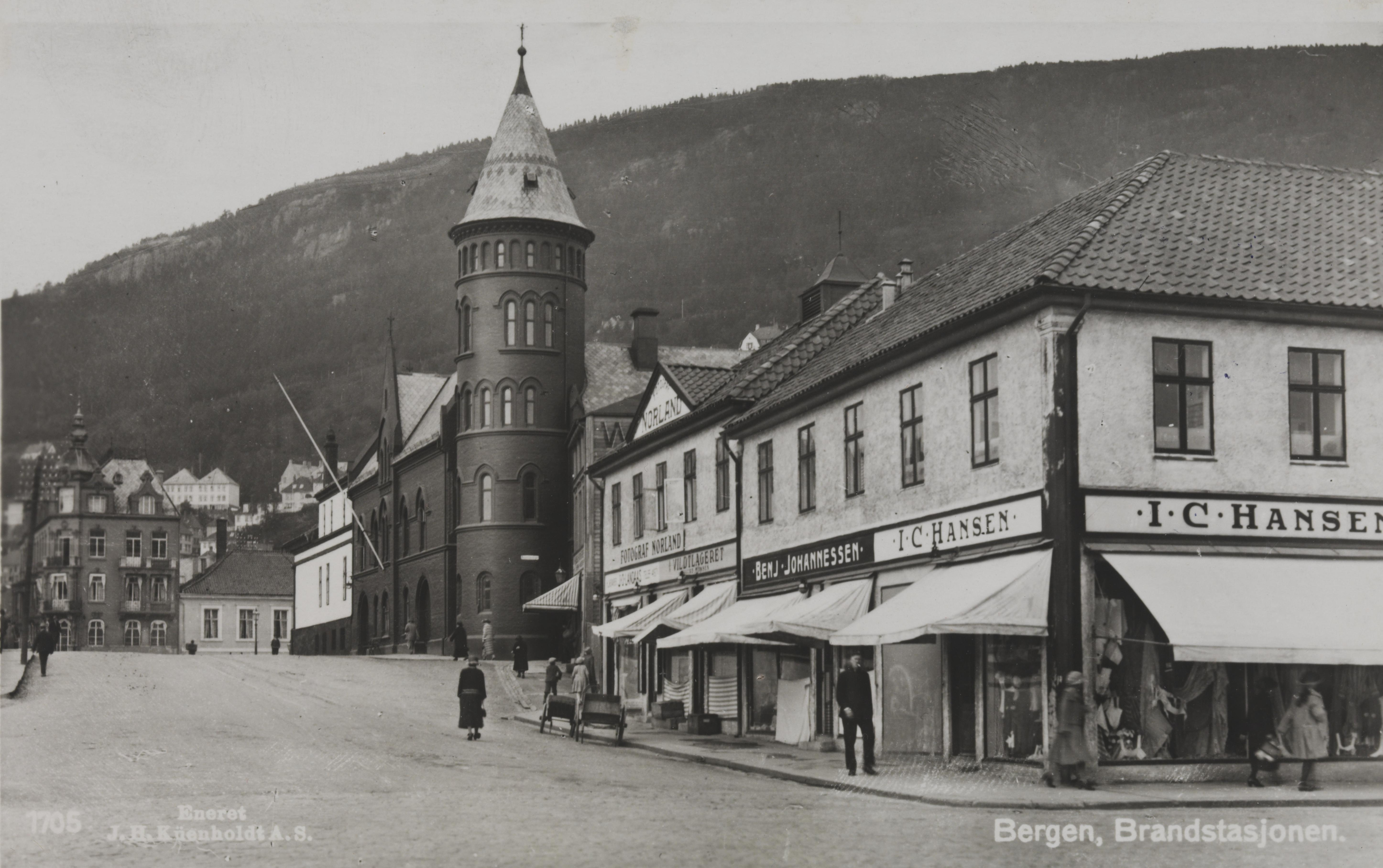 Bildet er hentet fra Nasjonalbibliotekets bildesamling Bergen, Hordaland